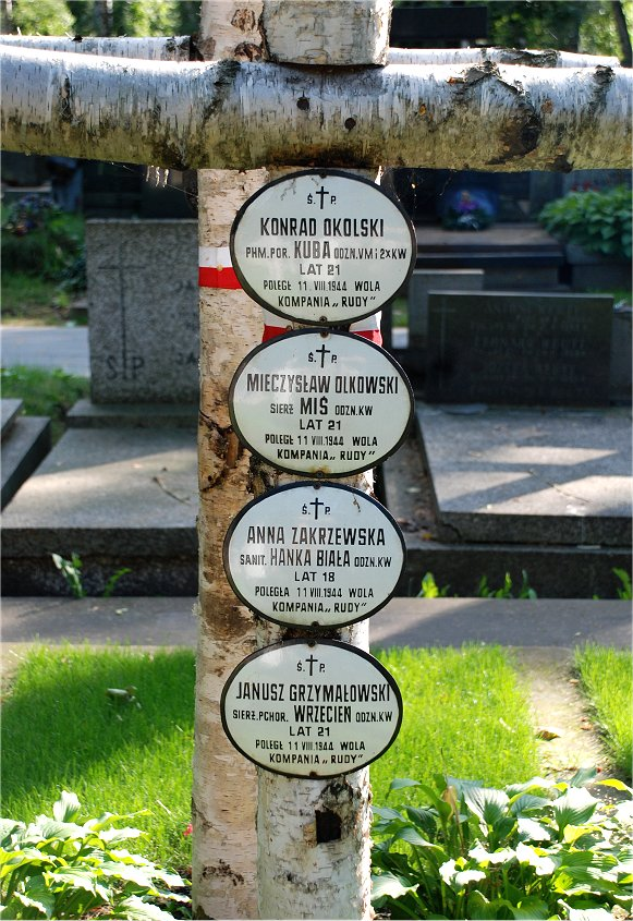 Powązki wojskowe w Warszawie